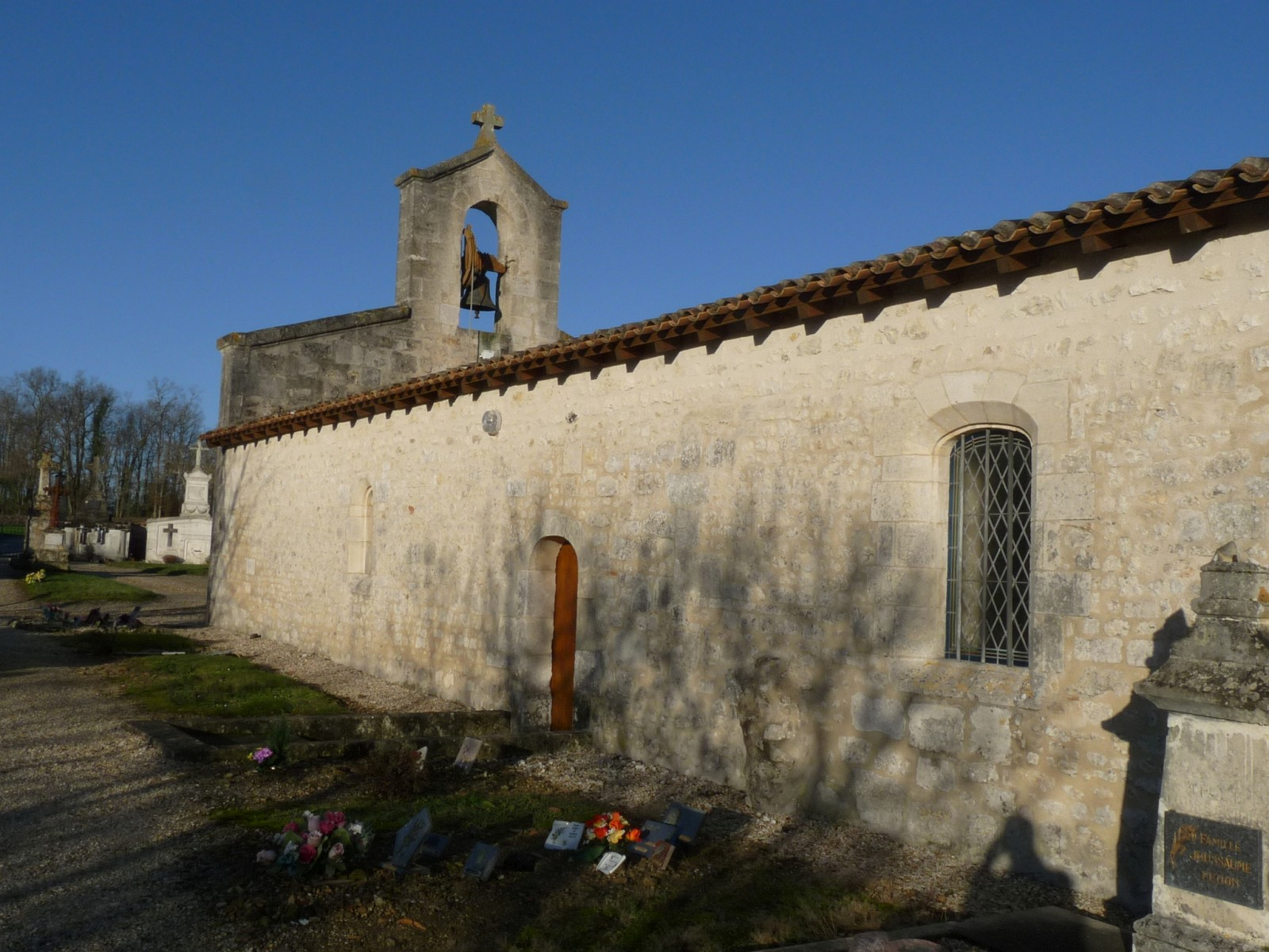 Eglise d'Expiremont, Charente-Maritime, France